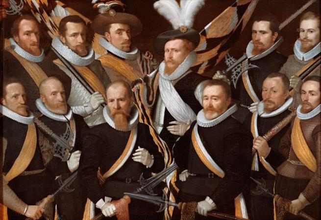 Officieren en vaandeldragers van de Jonge Schutterij, voor de Nieuwe of Sint Sebastiaansdoelen, Alkmaar.